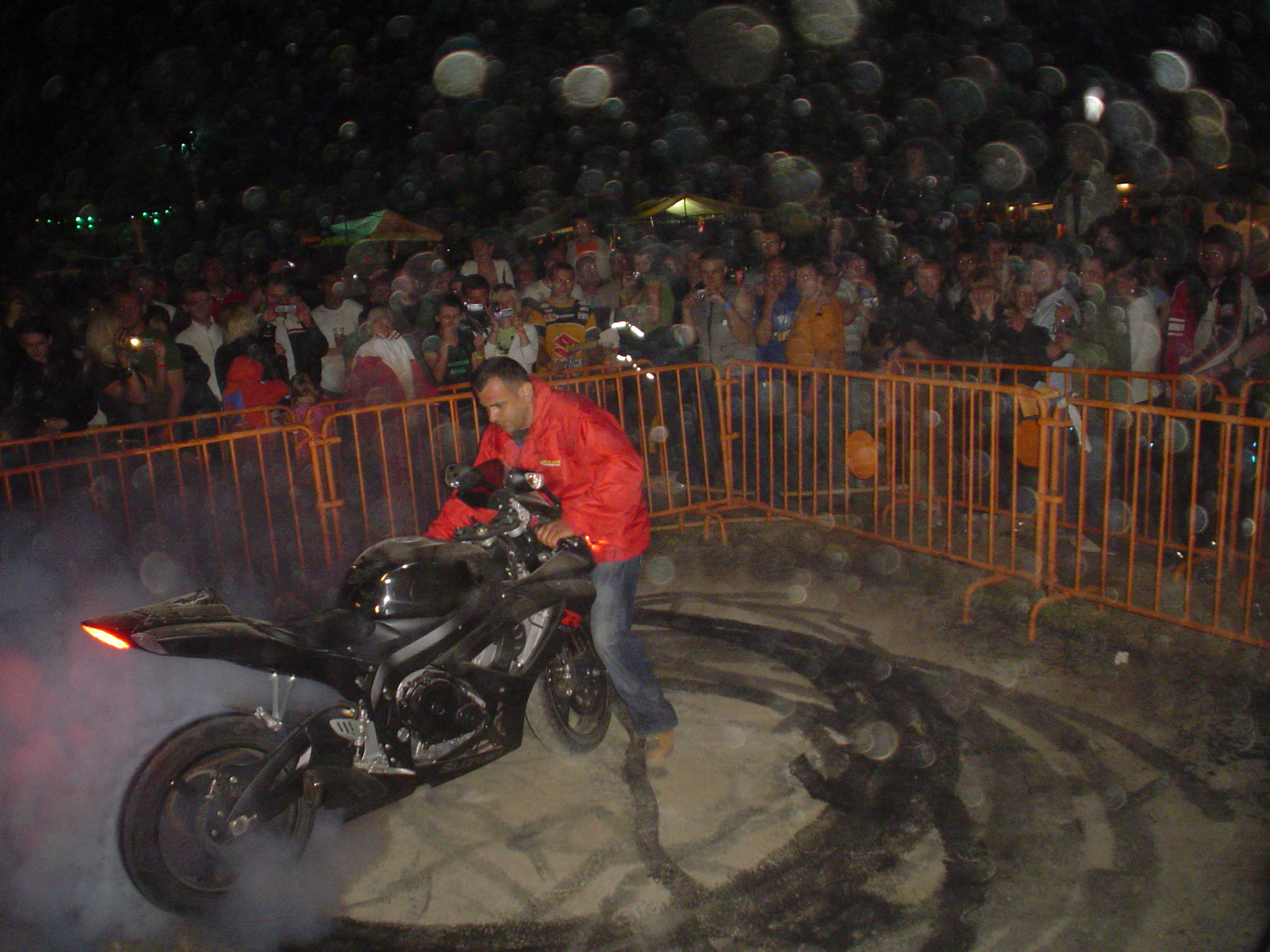 Mega Biker's Susret No. 5,SRC Poloj, Slavonski Brod (paljenje gume).